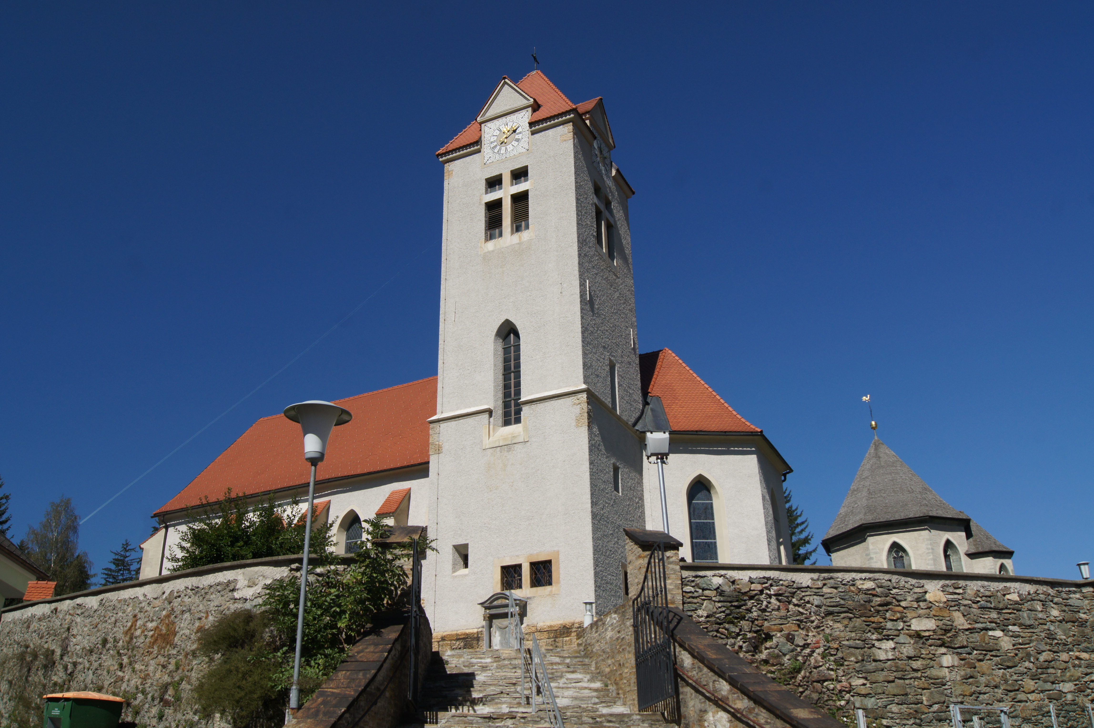 Kath. Pfarrkirche hl. Katharina